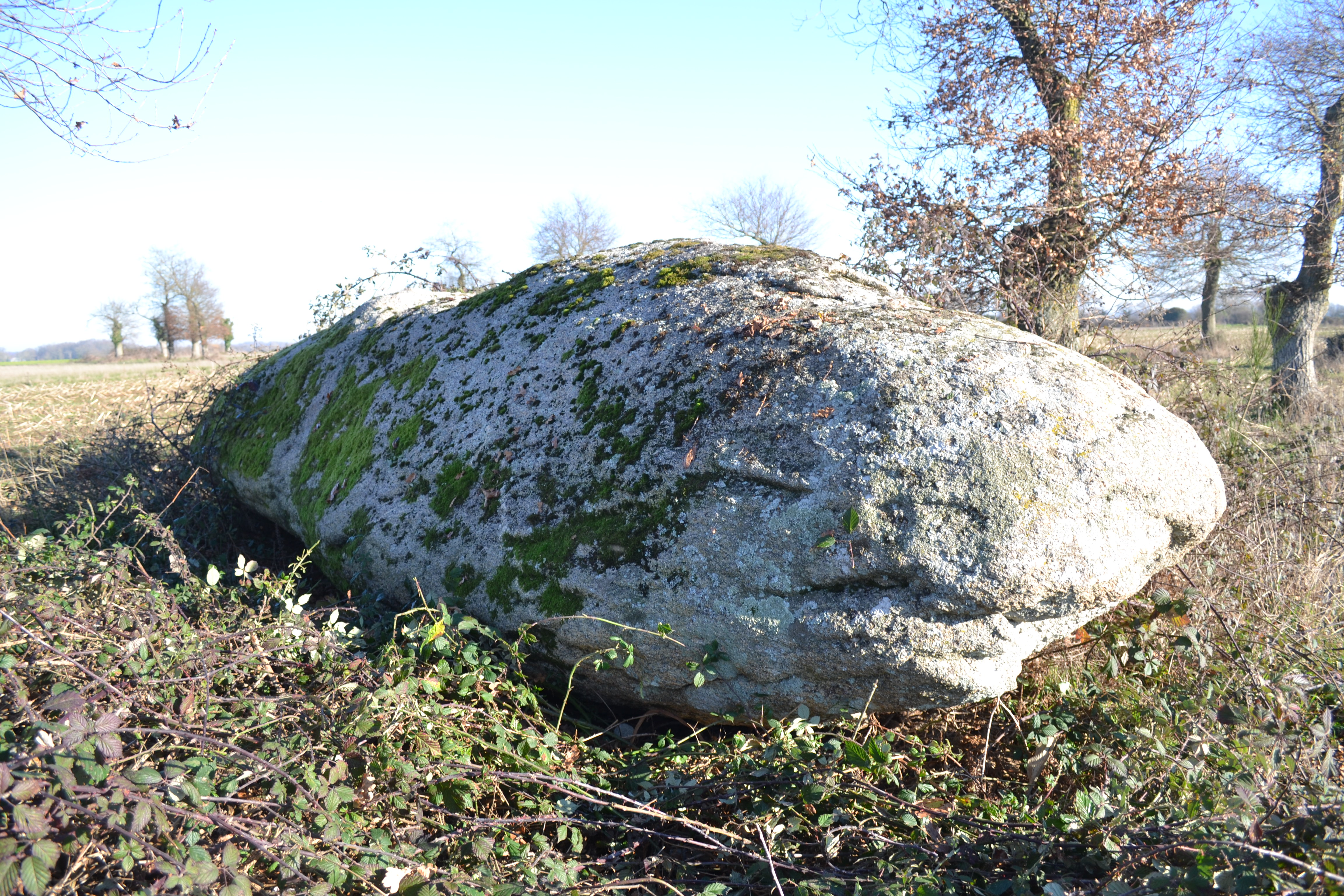 Menhir couché du moulin à vent de Normandeau, La Reandudière (49). Classé monument historique.